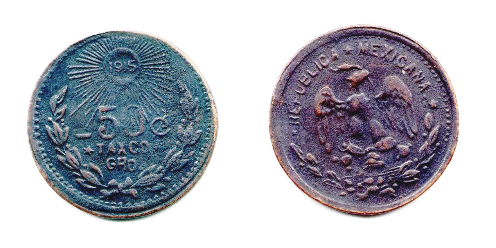 Moneda de 50 centavos de cobre acuñada en la ciudad de Taxco en 1915. Presumiblemente falsa, al igual que las idénticas pero acuñada en plata, también presuntamente falsas.